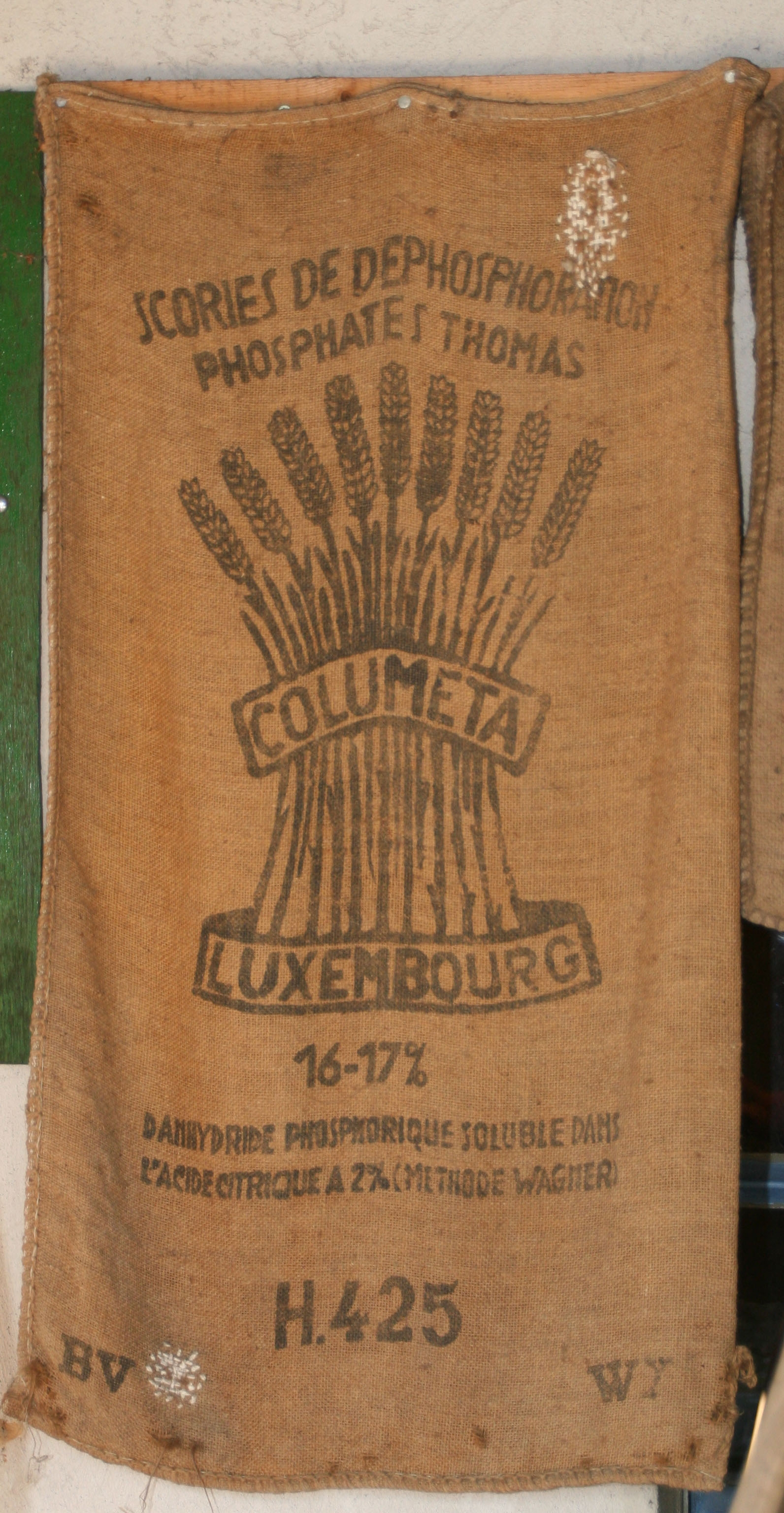 Thomasmehl.